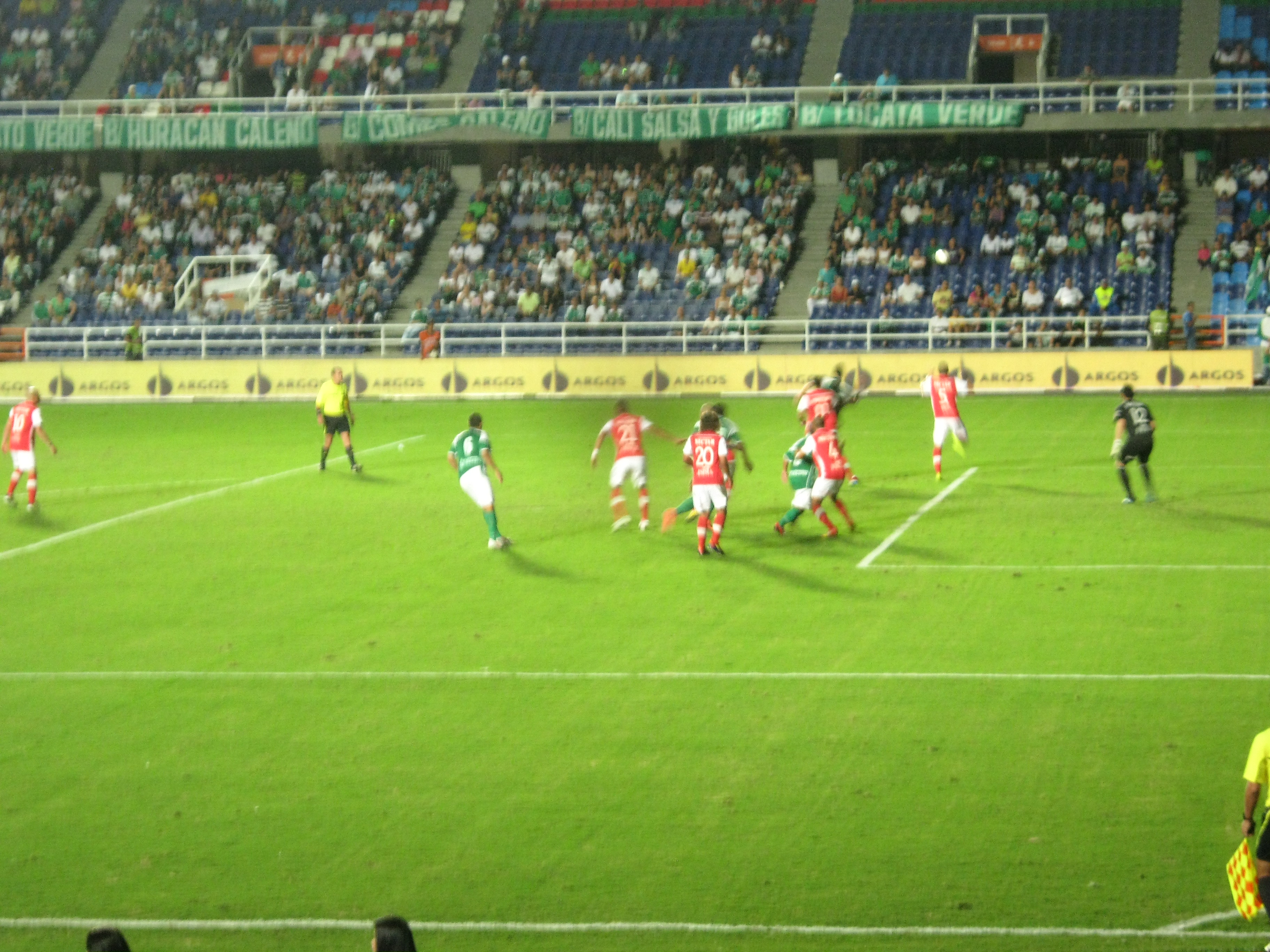 Encuentro del Deportivo Cali contra Santa Fe, por la 16ta fecha